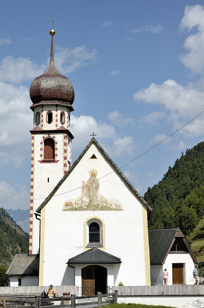 Pfarrkirche hl. Jakob